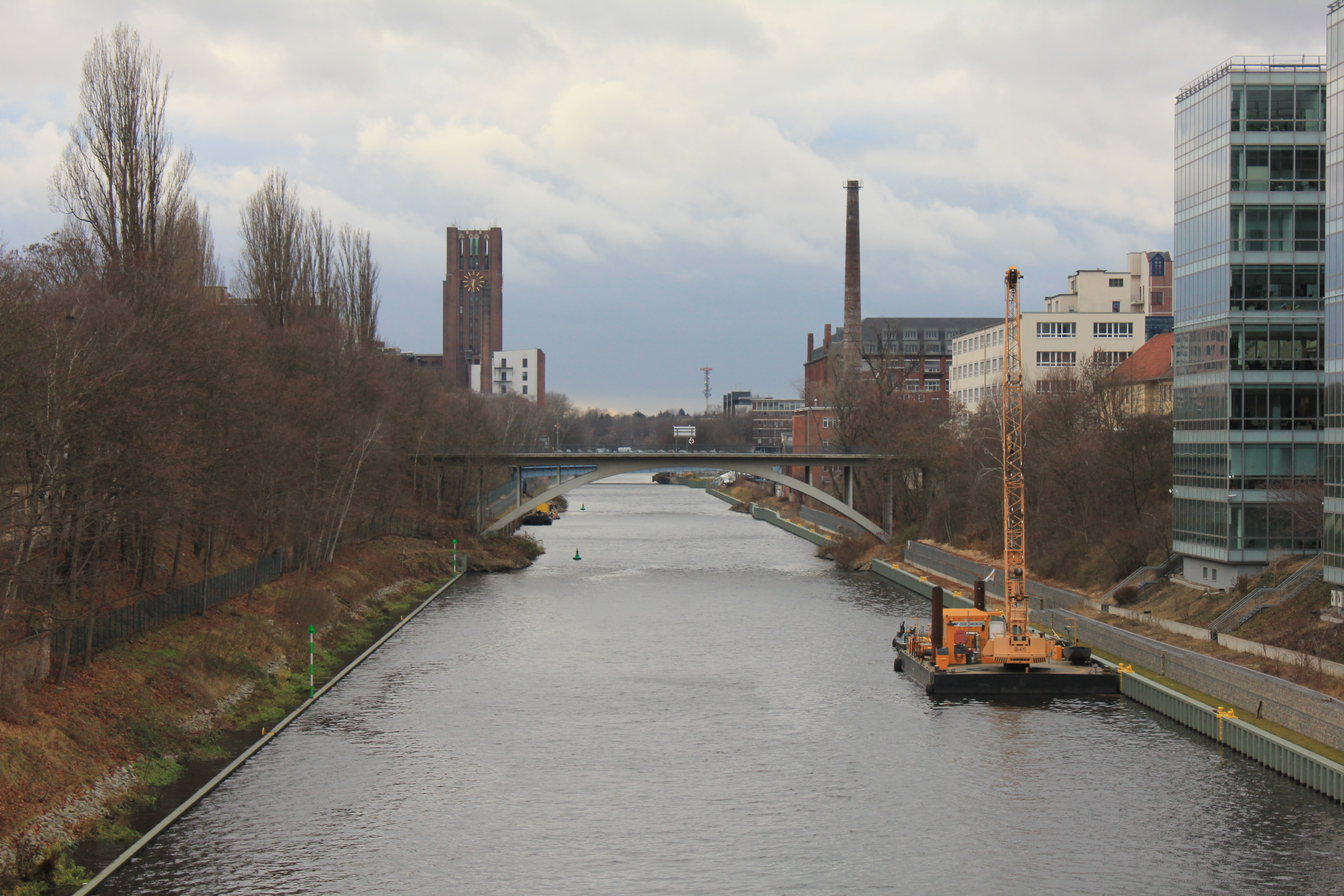 Colditzbrücke 1957-58 von Wayß & Freytag AG